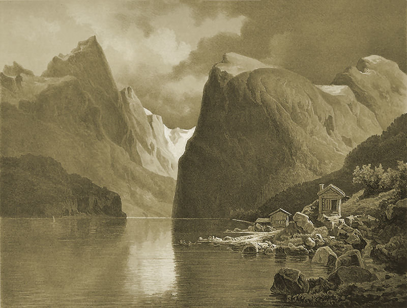 Nordangfjorden, Stranda muncipality, Møre og Romsdal county, Norway